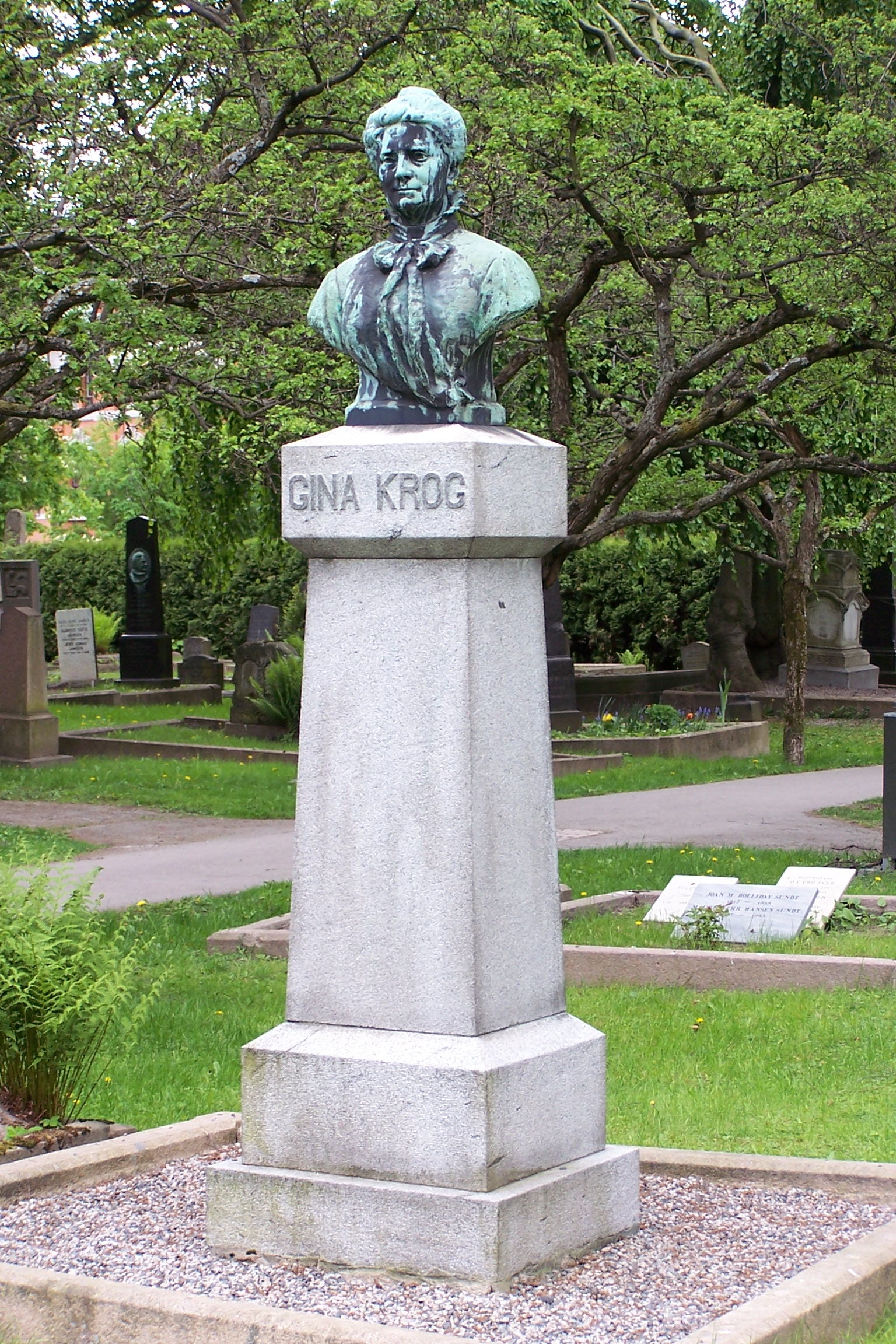 Tomb of Gina Krog at Vår Frelsers gravlund, Oslo. Bust from 1919 by Ambrosia Tønnesen.